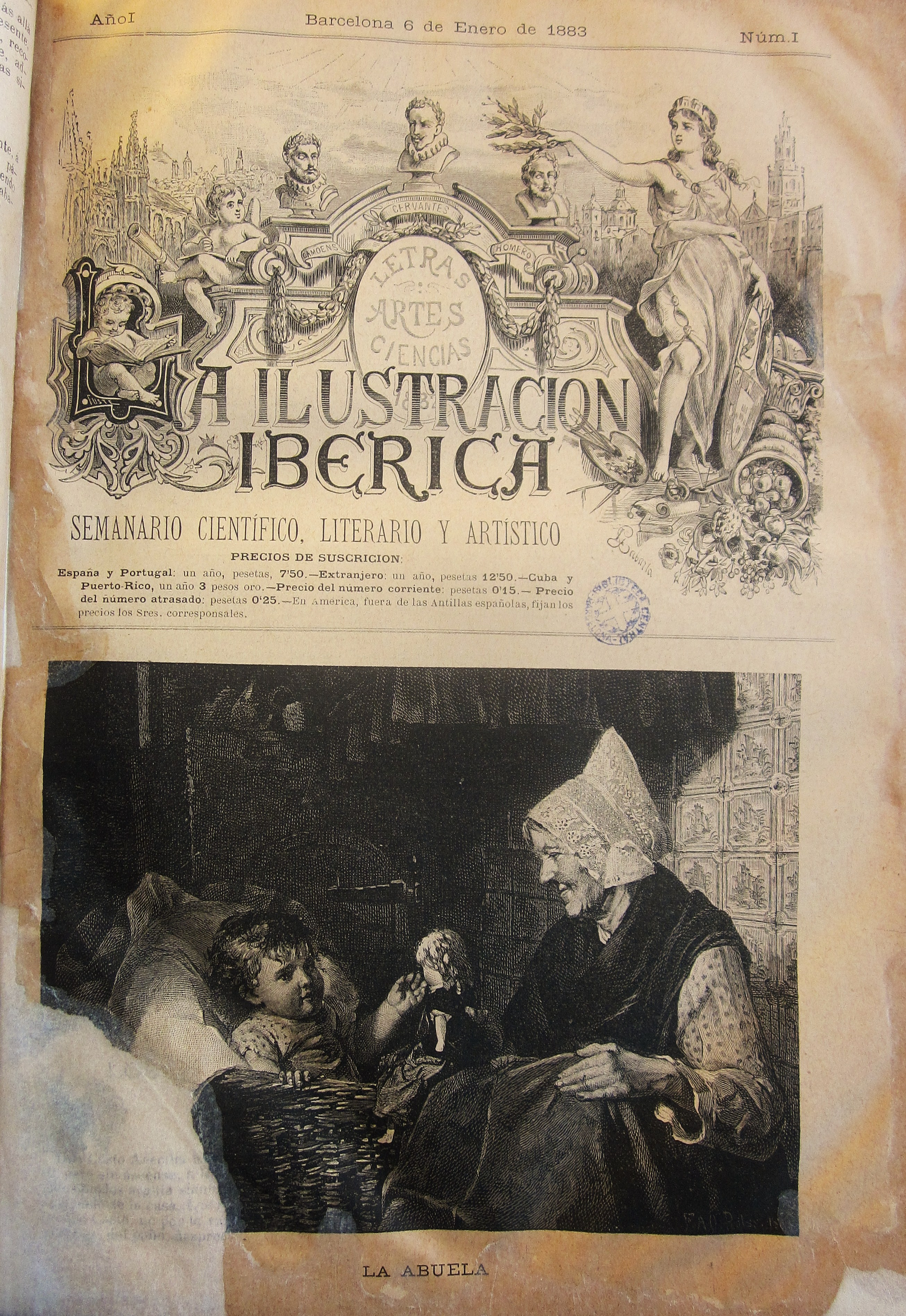 primera portada del setmanari La ilustración Ibérica